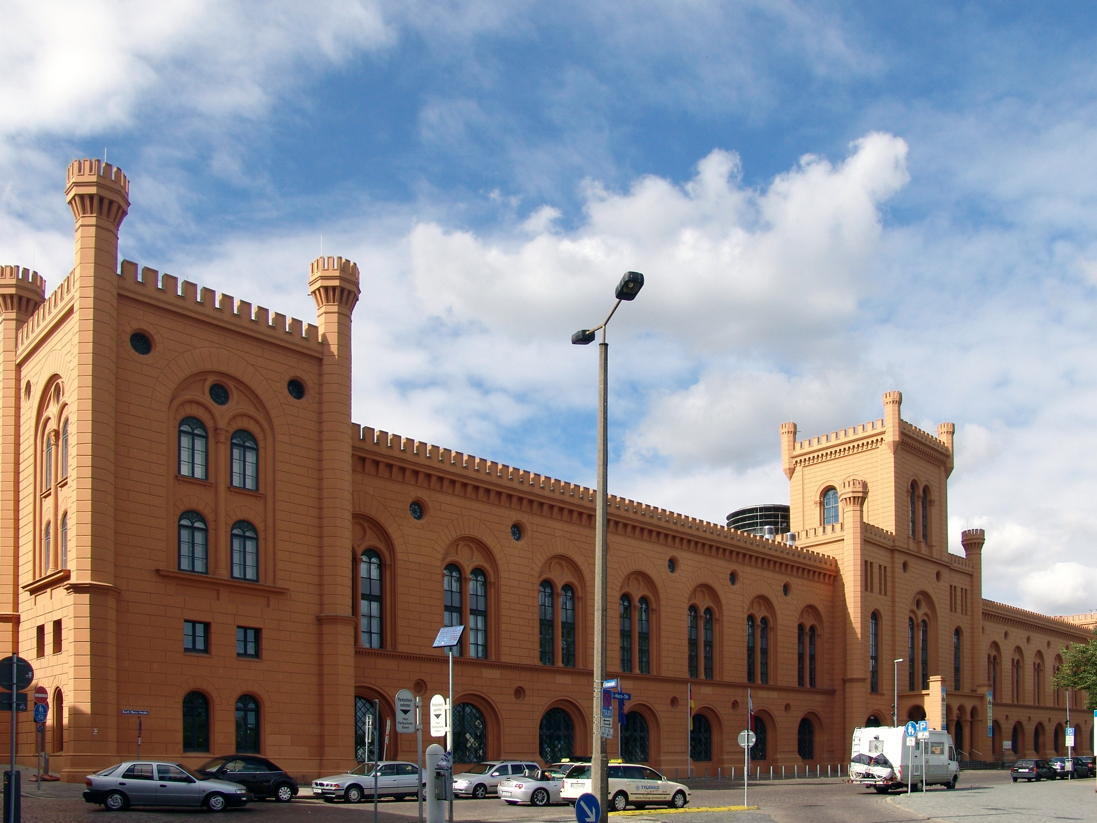 Schwerin, Germany. Arsenal am Pfaffenteich (Home Ministry). Sept 2005, own work.